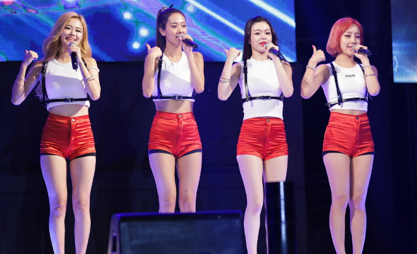 배드키즈 한마음 위문공연 CBS 러빙유 콘서트 양평 개군 레포츠 공원